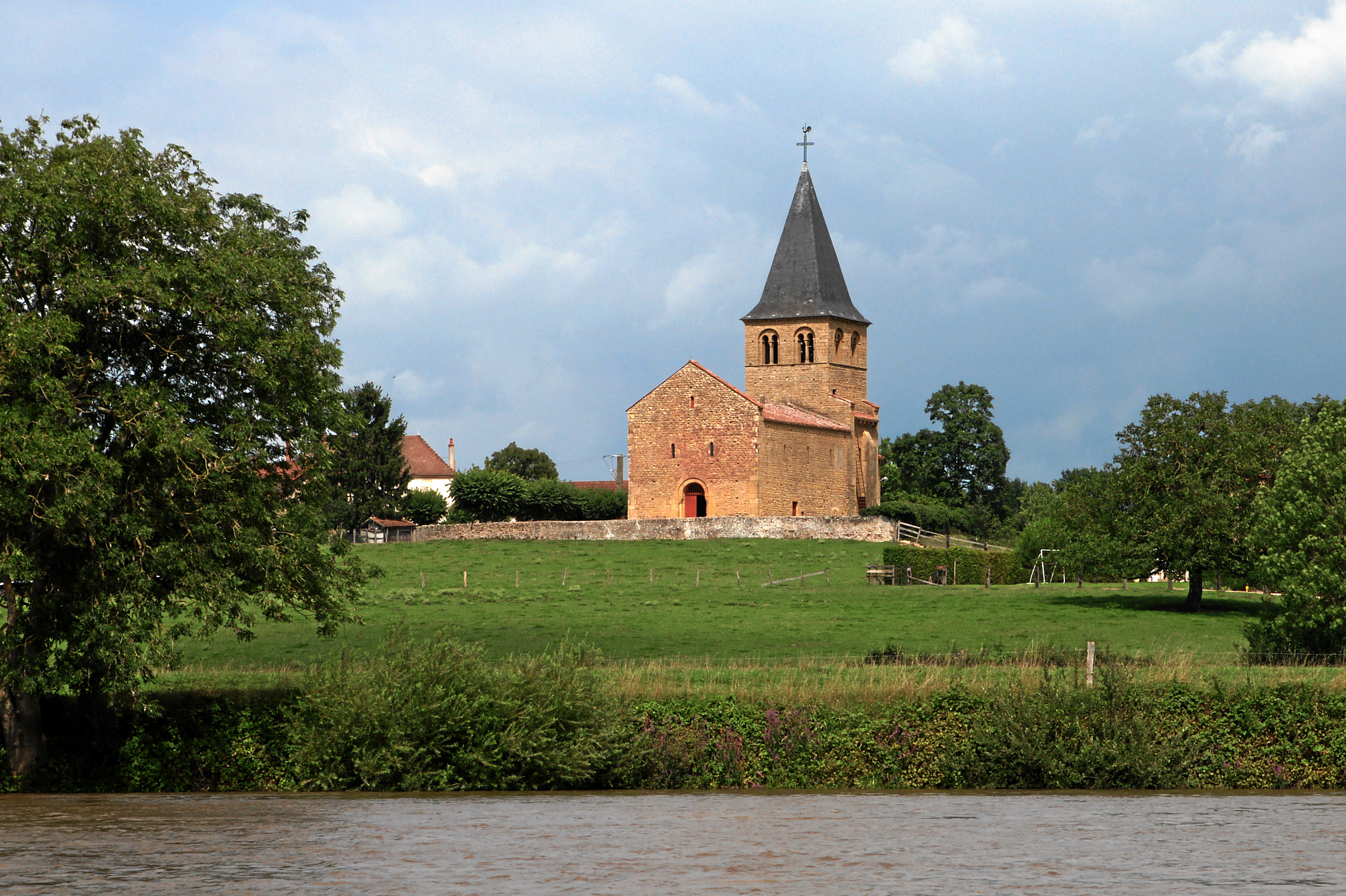 Baugy (Saône-et-Loire): Eglise Saint-Point